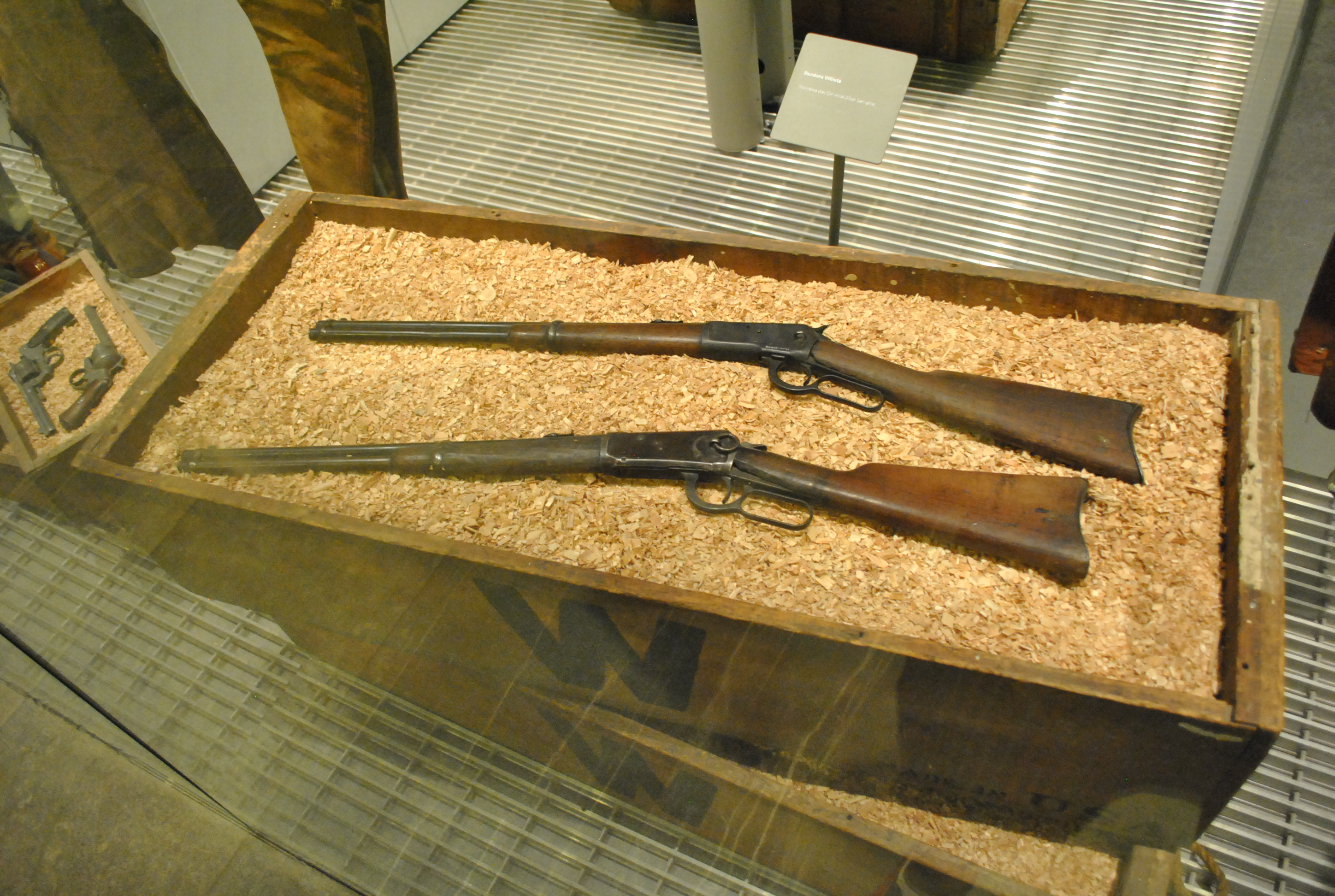 Rifles Winchester modelo 1894, conocidas en México como "Carabina 30-30", y usadas en la Revolución mexicana.